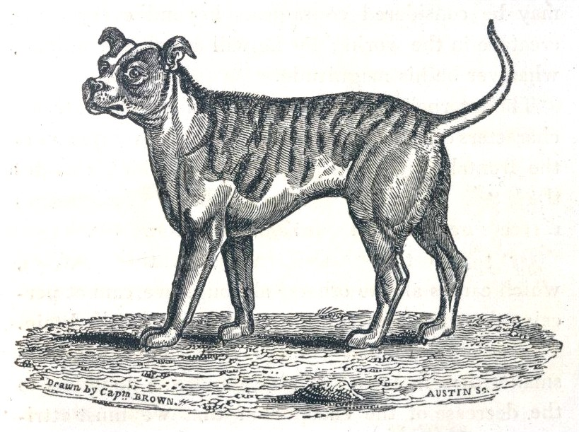 The Bull-Dog (engraving)